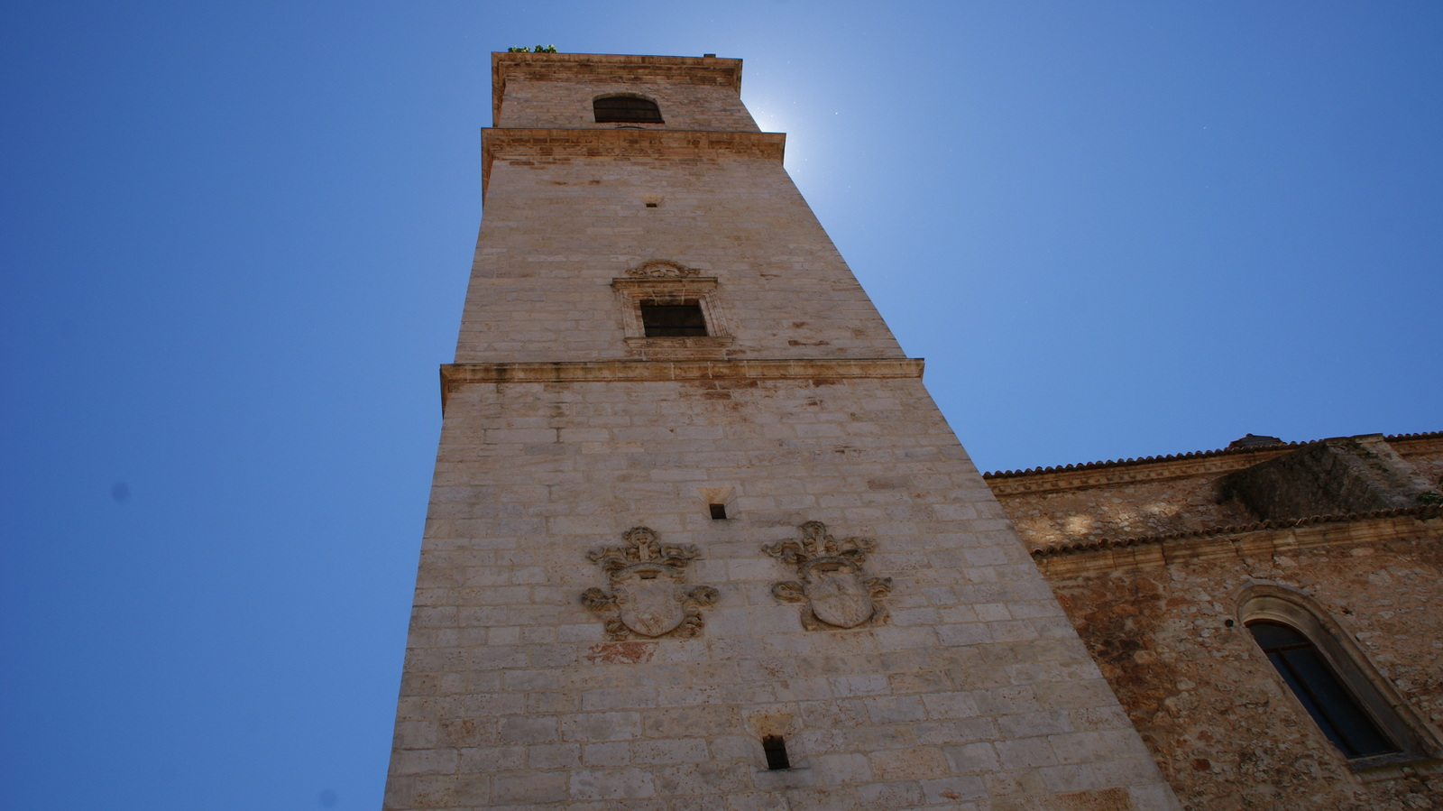 Torre campanario de la Iglesia Parroquial de Stª María Magdalena, siglo XV, una de las primeras del renacimiento español, Mondéjar, Guadalajara